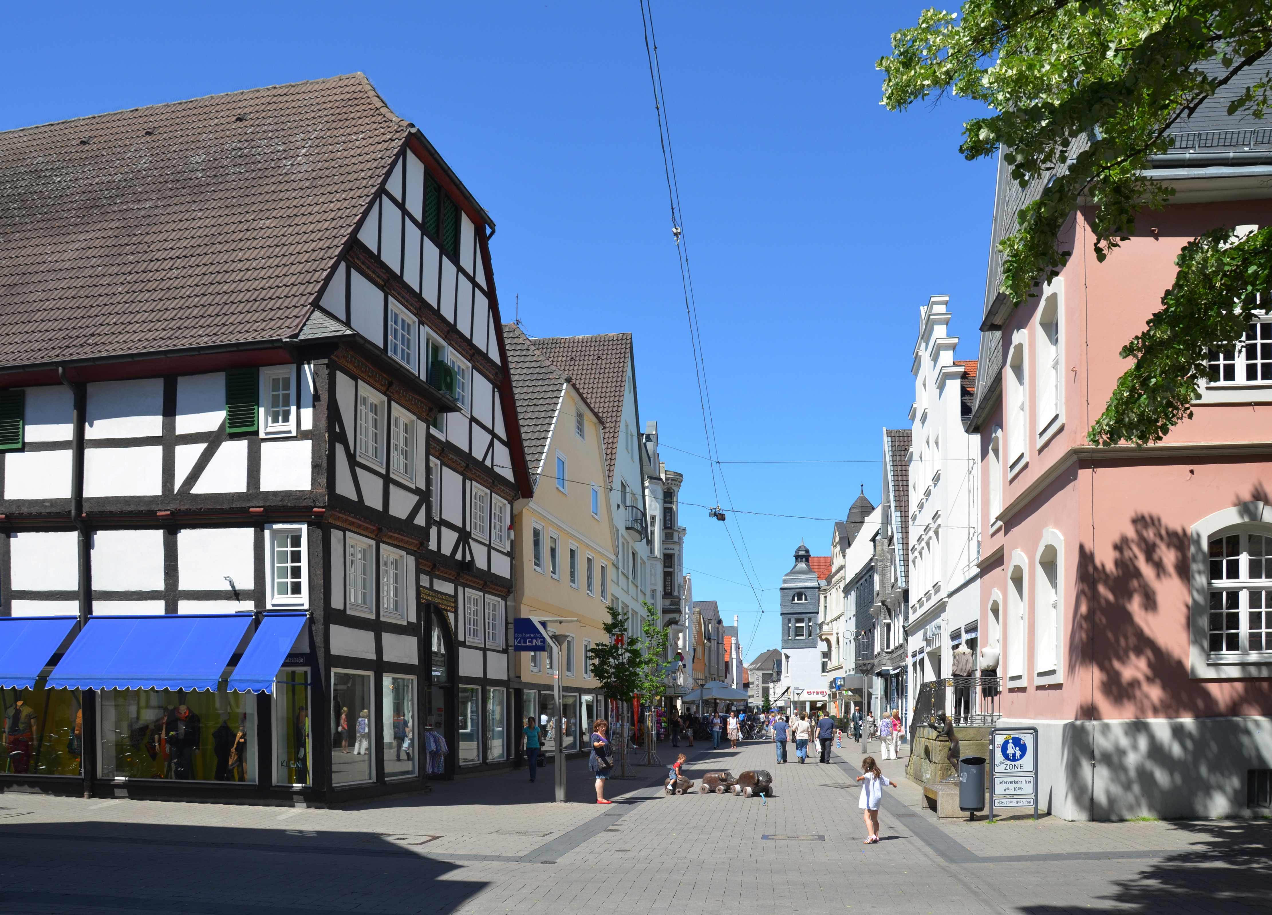 Lange Straße Lippstadt